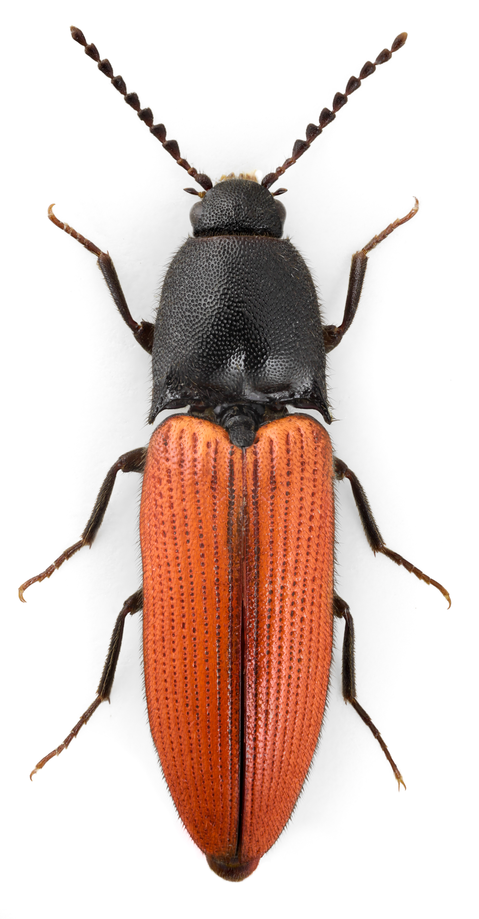 Ampedus cardinalis